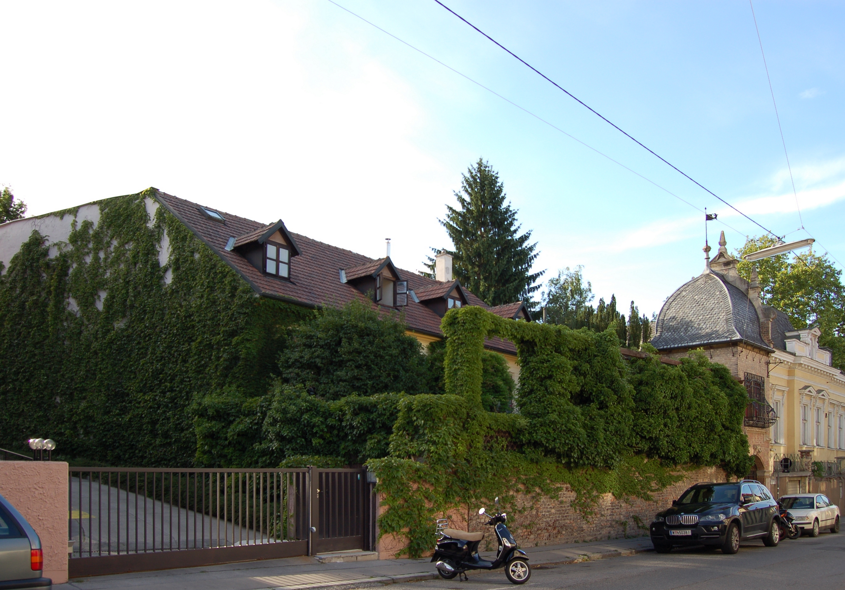 Die denkmalgeschützte, sogenannte Bärenvilla in der Andergasse 8 in Wien-Hernals diente als Wohn- und Arbeitsstätte von Friedrich von Schmidt, Otto Jarl und Karin Jarl-Sakellarios. Das im Kern hakenförmige Weinhauerhaus aus dem Anfang des 19. Jahrhunderts wurde mehrfach umgebaut und vergrößert. Die Terrasse mit Torturm wurde 1879 von Franz Glaser sen. errichtet.